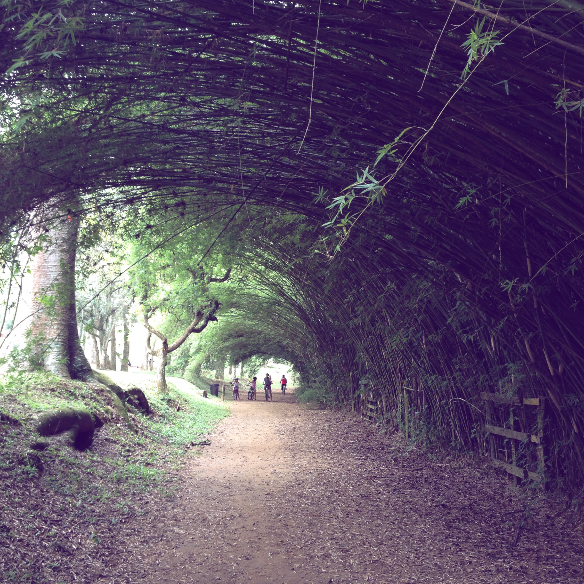 Onda de bambus formando uma arco sobre o caminho dos ciclistas